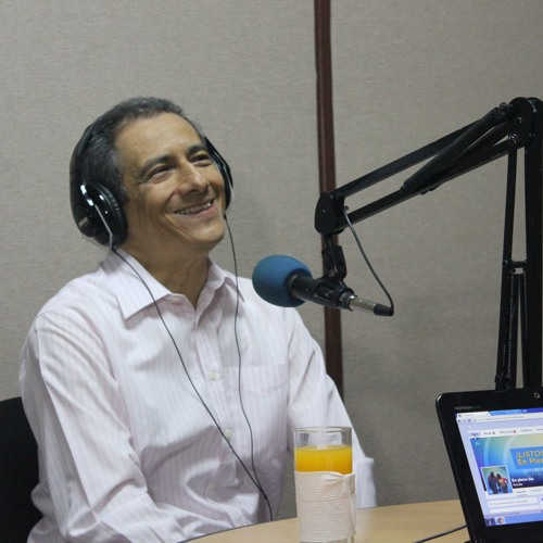 Pastor General de Misión Cristiana Elim